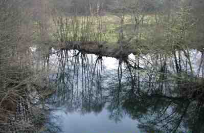 Vista da confluenza dos ríos Madanela e Trimaz, no lugar dos Pasos, en Vilalba, pouco antes de entroncar co Río Fabilos, formando o Río Ladra. O río Madanela aparece pola parte dereita da imaxe e o Trimaz pola esquerda, saíndo a auga pola parte de baixo da foto. Tomada por user:Agremon Uploaded by User:Agremon